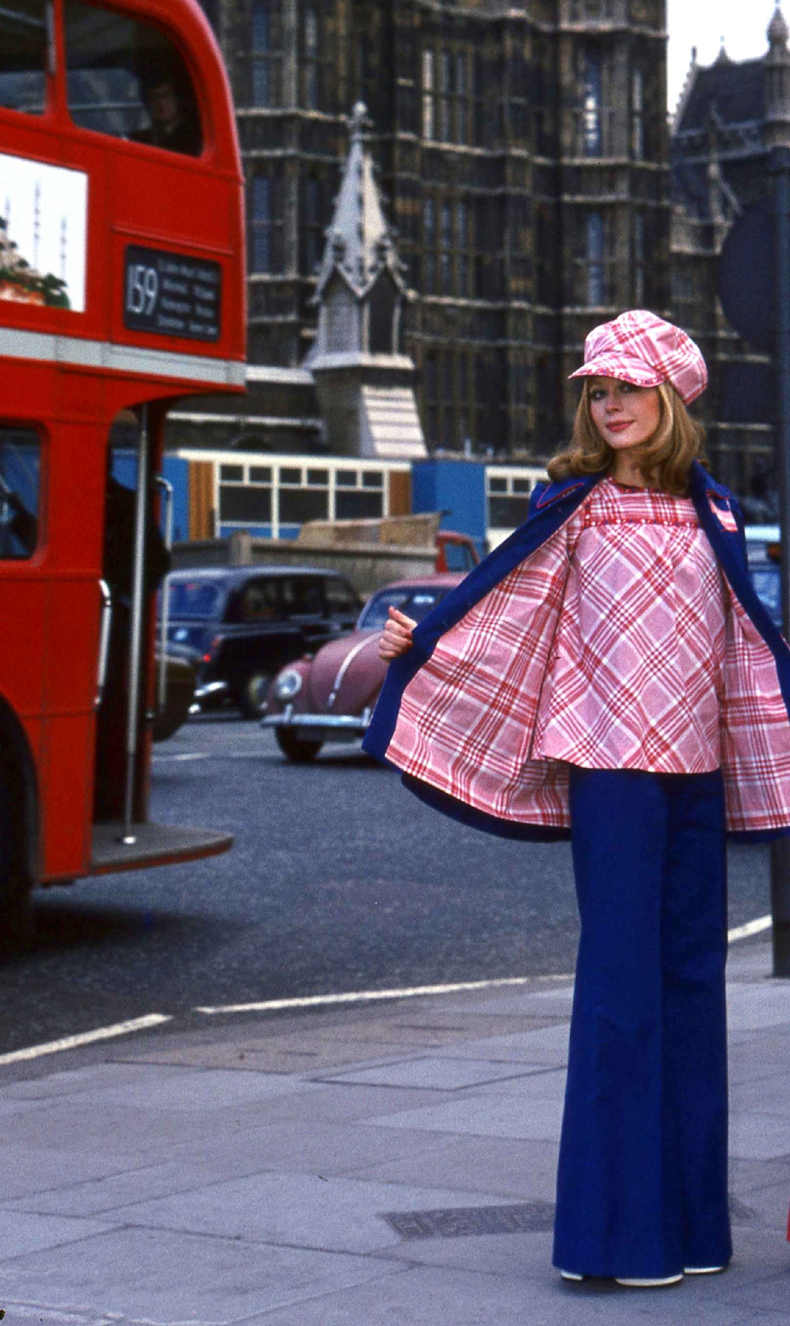 Parliament square a St. Margaret street torkolatánál, szemben a Westminster-palota. Balra Fekete Klári manöken. Location: United Kingdom Tags: bus, double-decker, colorful, church, fashion Title: Parliament square a St. Margaret street torkolatánál, szemben a Westminster-palota. Balra Fekete Klári manöken.